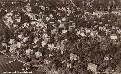 Nockeby med Höglandstorget, Bromma, flygfoto, vykort, 1930-40-talet.